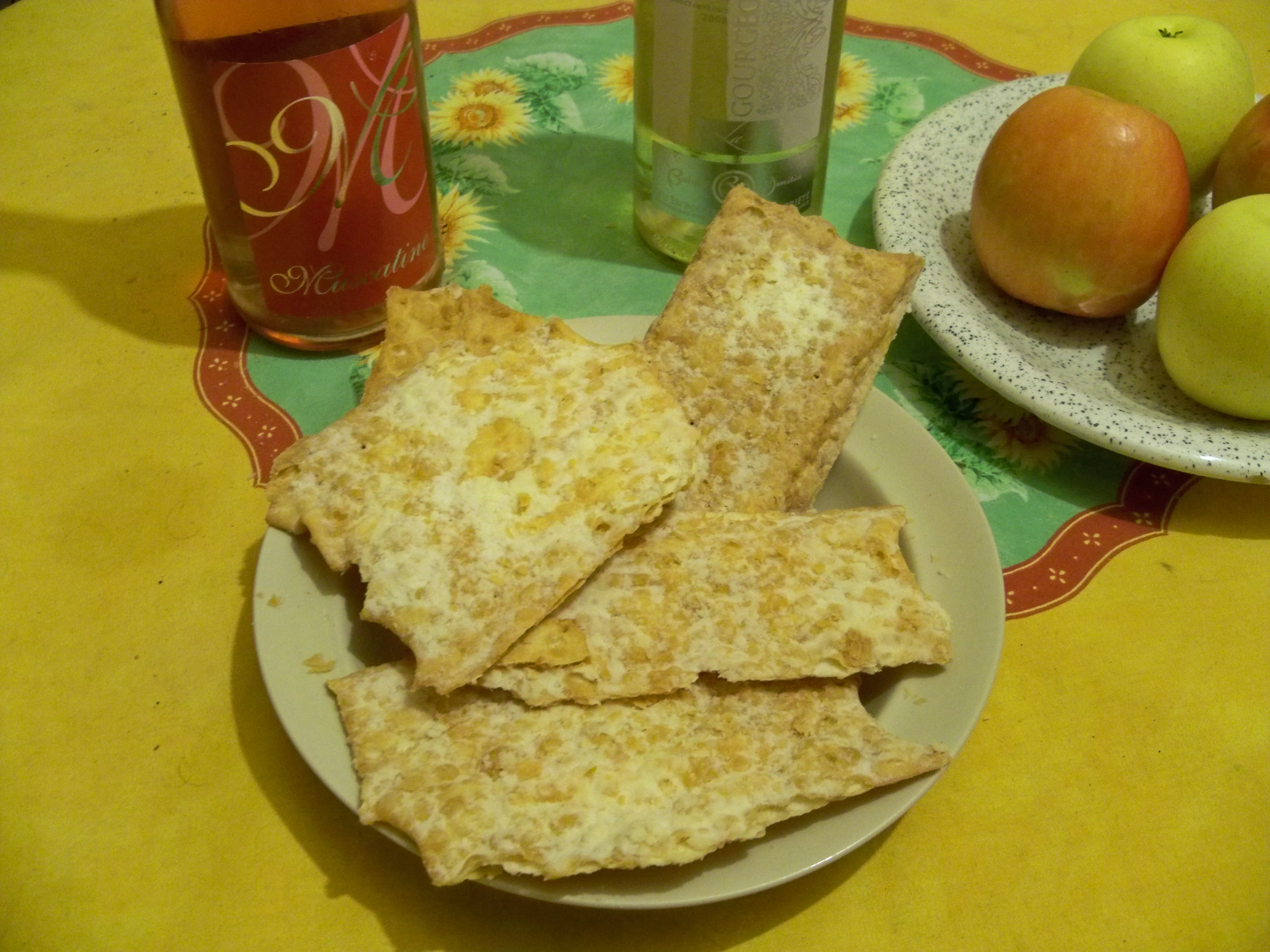 Oreillette, gateaux de Provence